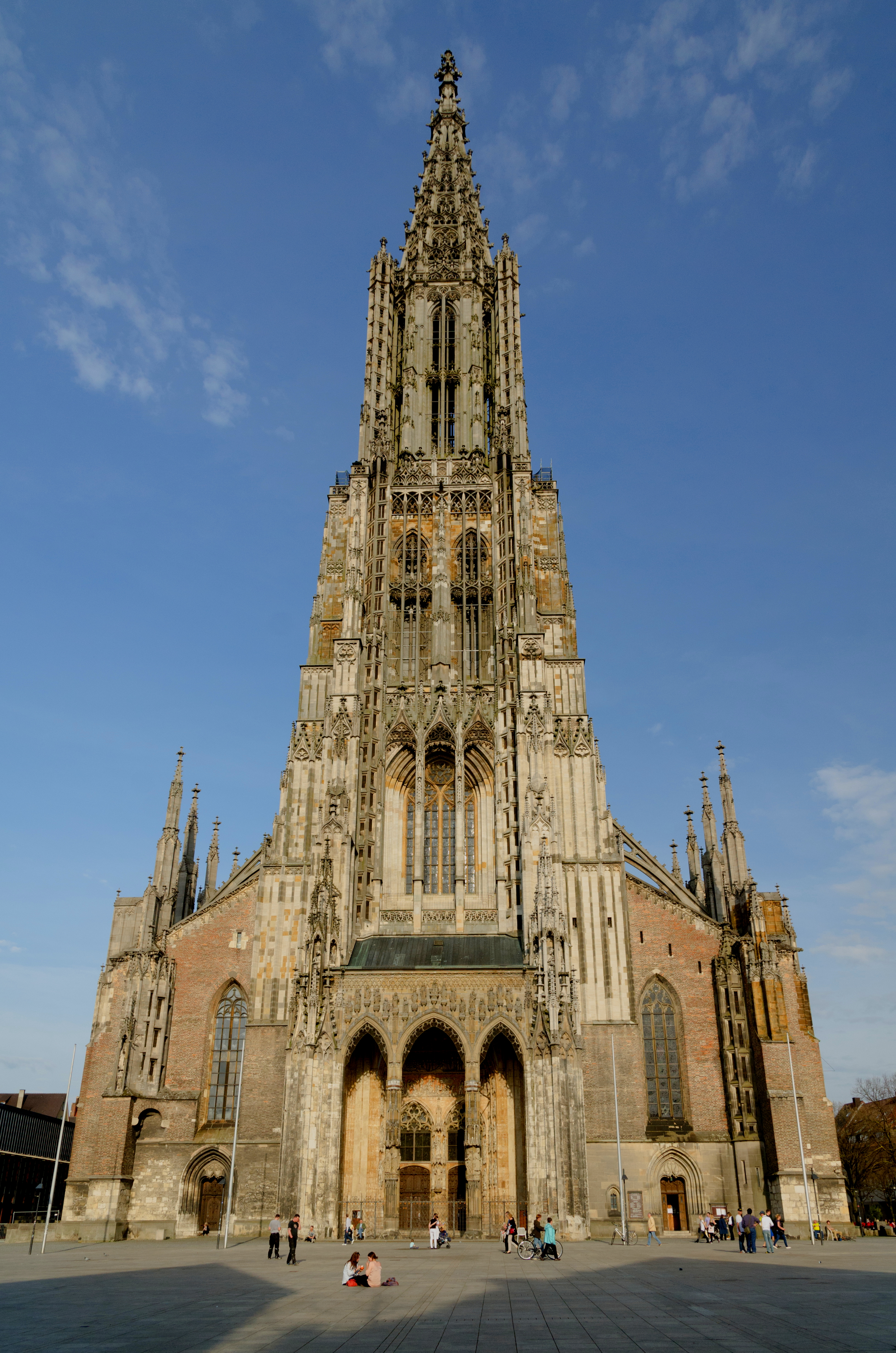 Der Haupturm des Ulmer Münsters